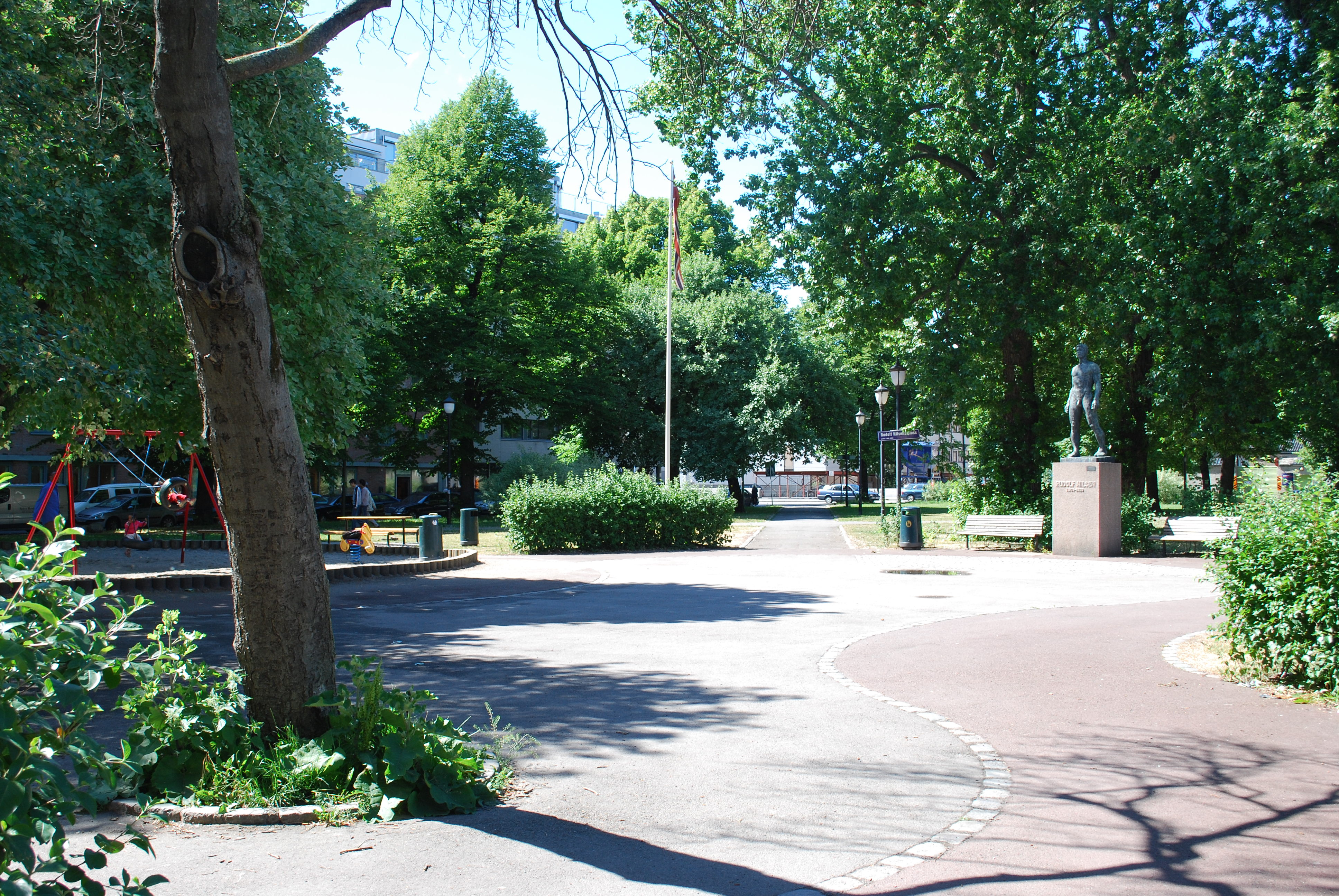 Rudolf Nilsens plass, Tøyen, Oslo, Norway